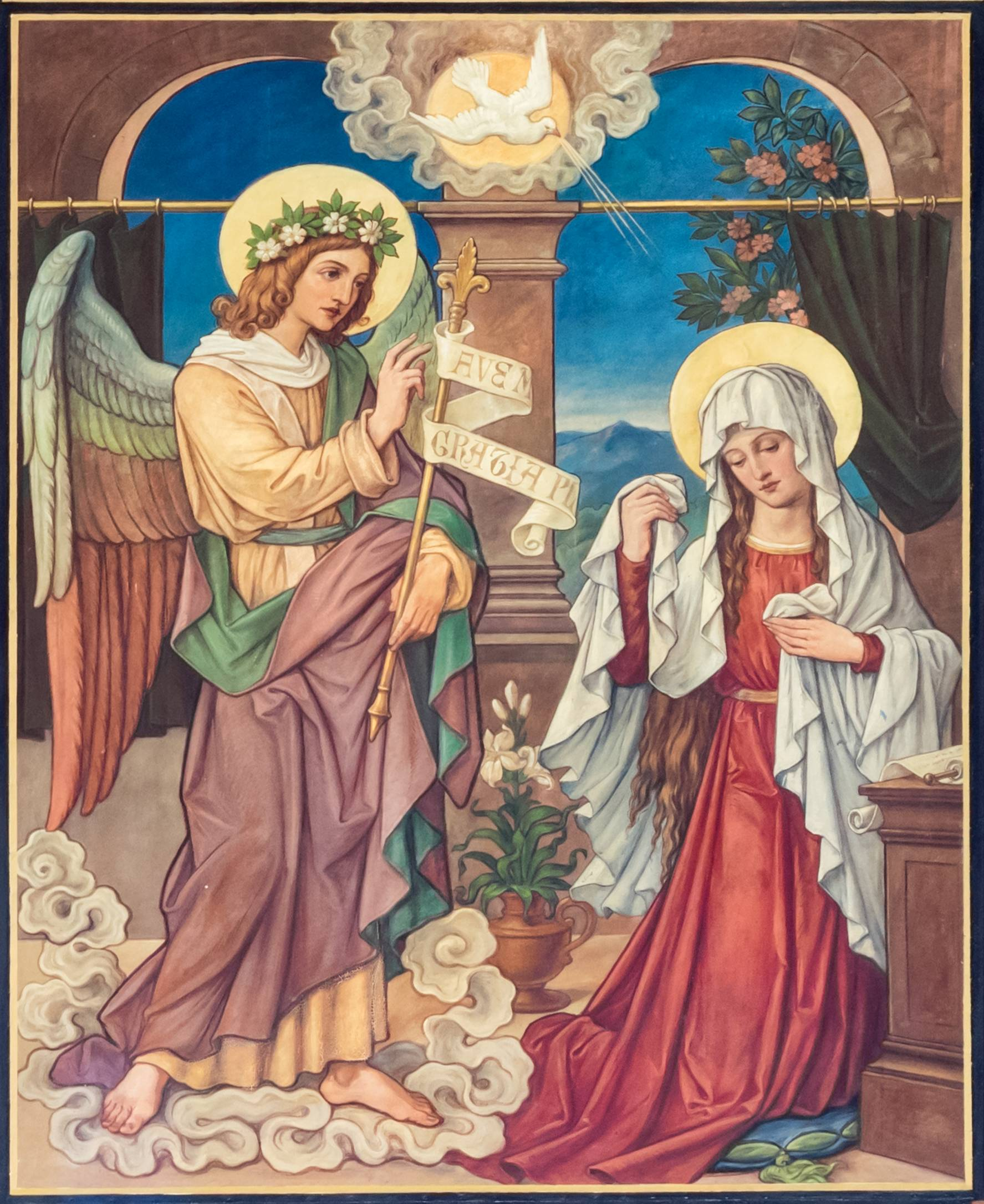 St. Peter und Paul in Bonndorf Das im Langhaus umlaufende Bilderband mit Statuen